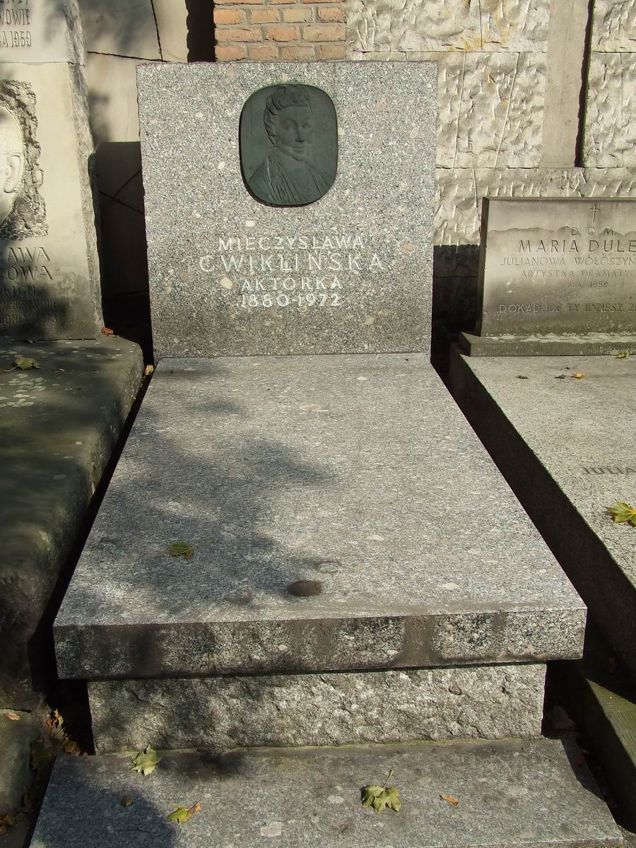 Mieczysława Ćwiklińska, grób, Stare Powązki